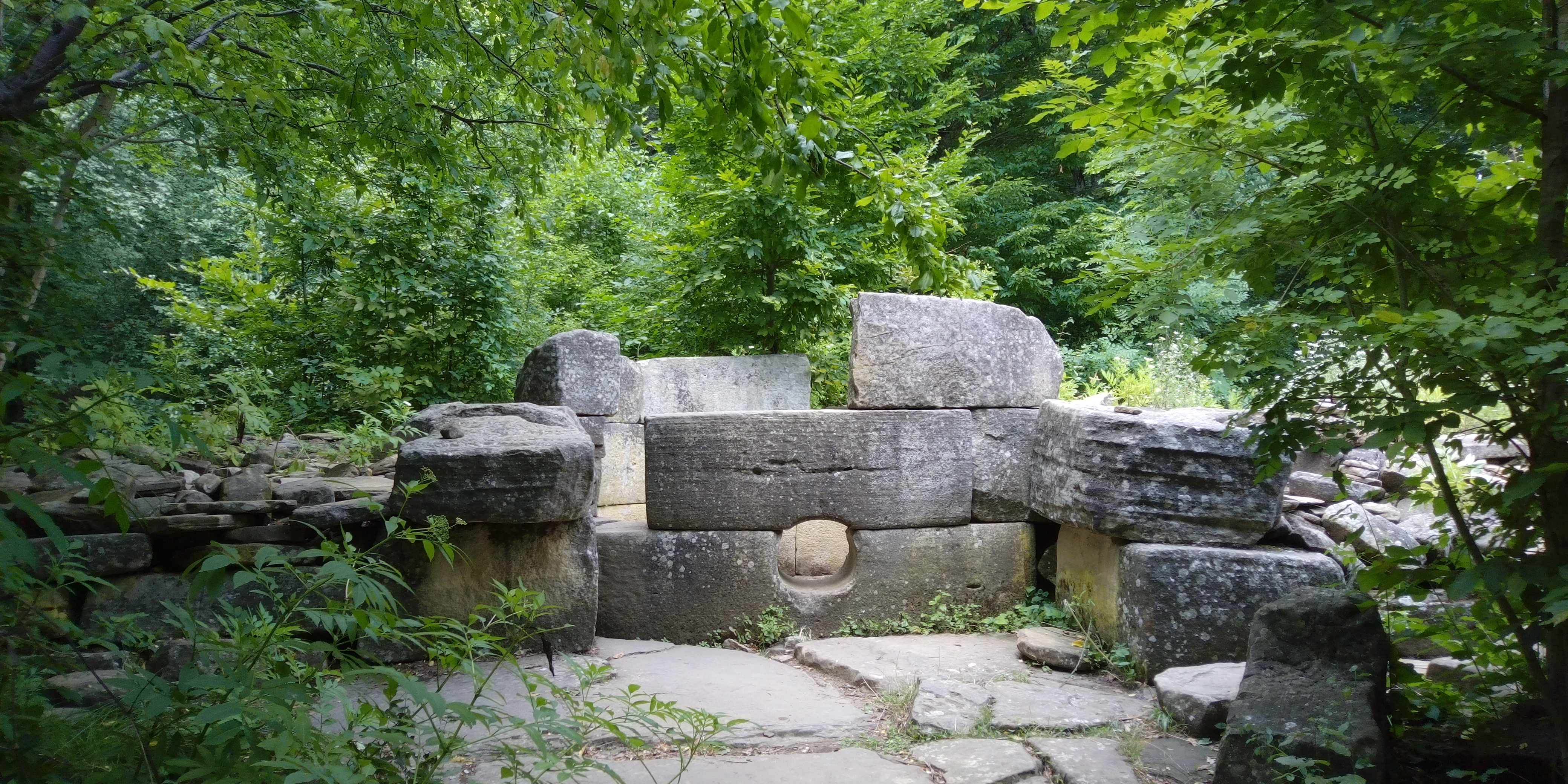 Круглый составной дольмен на Жане, левый в первой группе. Недавно найденные новые блоки верхнего яруса кладки уложены на место, по их форме видно что этот ярус был последним. На них есть вытески - дольмен имел зачатки оформления портала, в отличие от правого круглого целого составного дольмена меньшего размера. Крыша не найдена и вероятно, была разрушена, возможно и упавшим деревом.